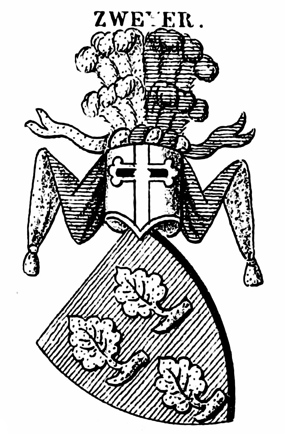 Wappen der Freiherren Zweyer von Evenbach (auch: Zwyer von Evibach); in Blau an drei grünen Zweigen drei grüne Lindenblätter (2. 1.) aufrecht stehend